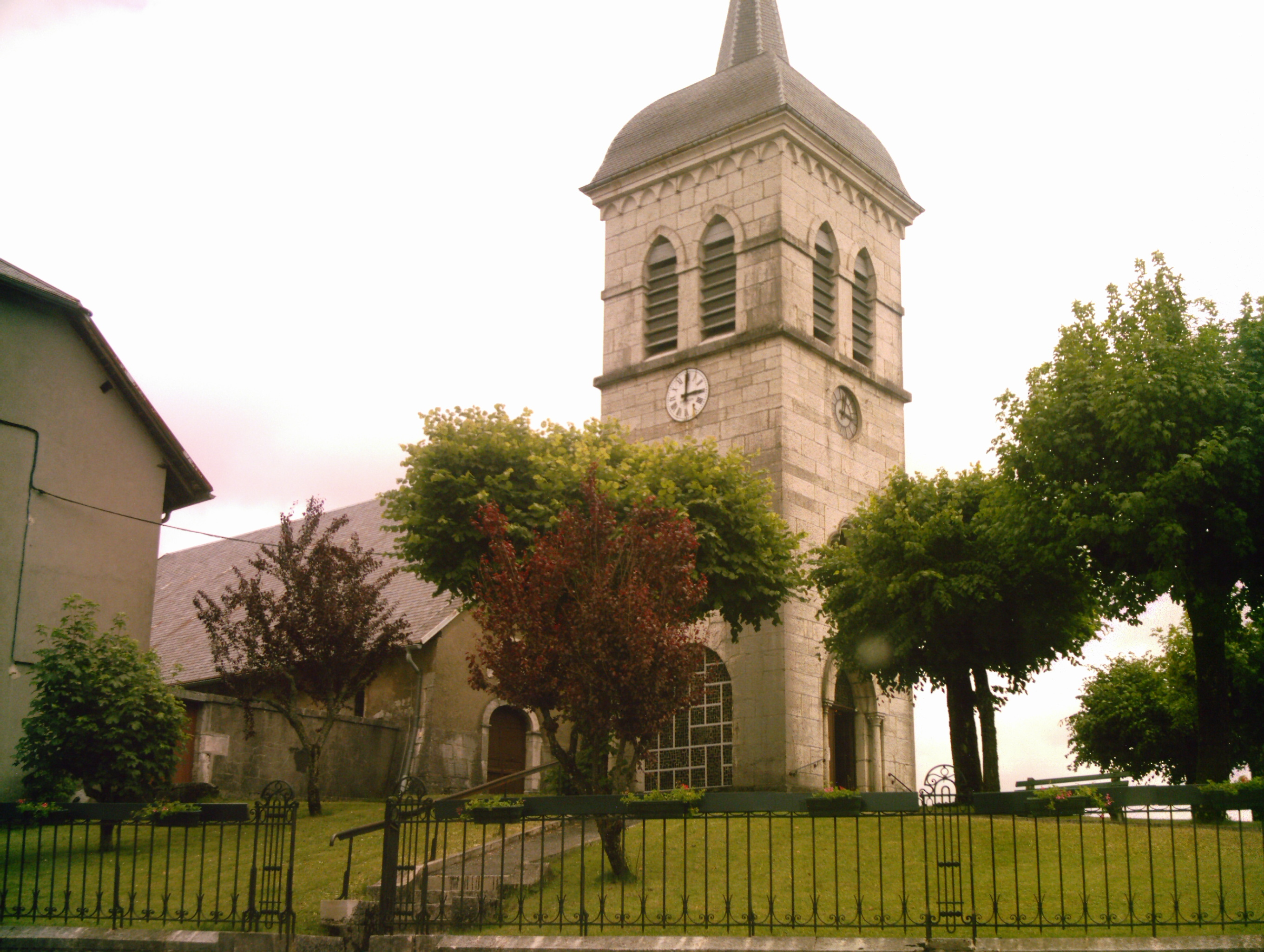 L'église de Brénod (Ain, FRANCE)